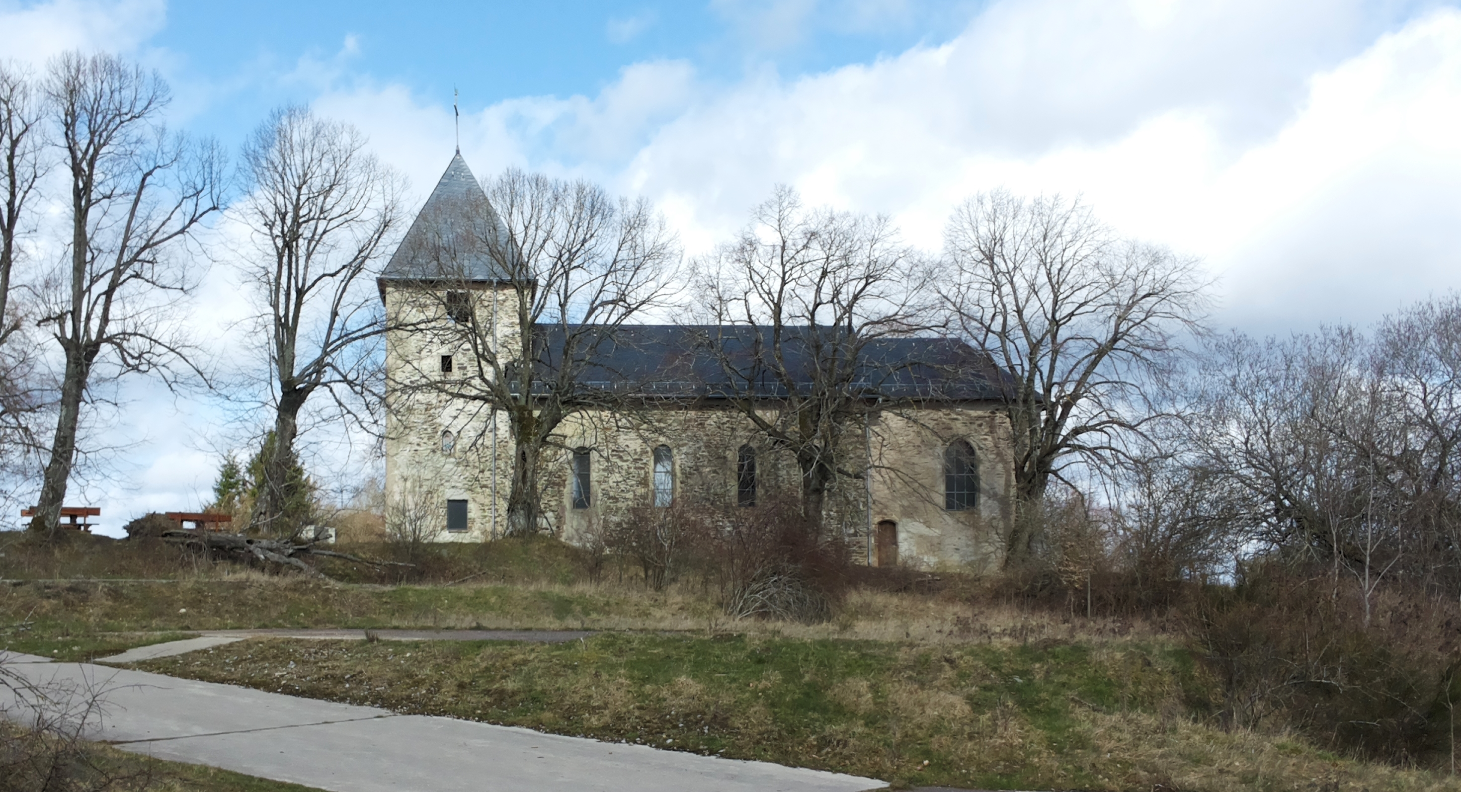 Kirche Wollseifen im März 2016